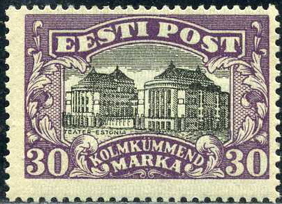 Почтовая марка Эстонии. Театр оперы и балета «Эстония», 1924